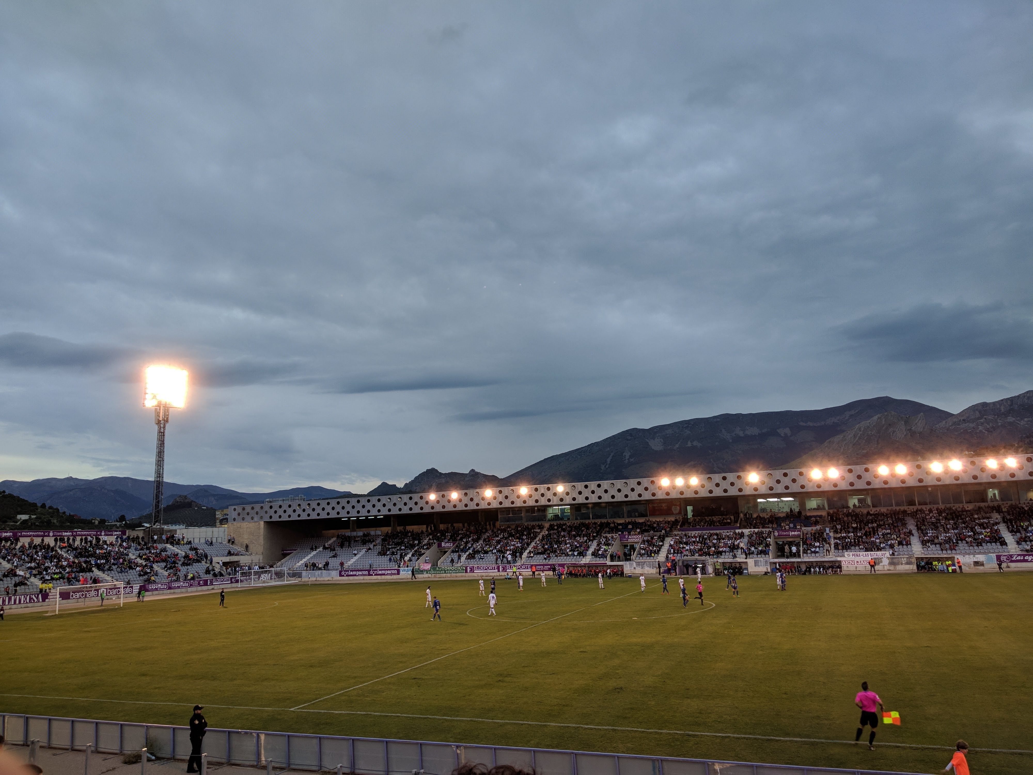 Partido de fase de ascenso a Segunda División B 2017-18, Real Jaén - Socuéllamos